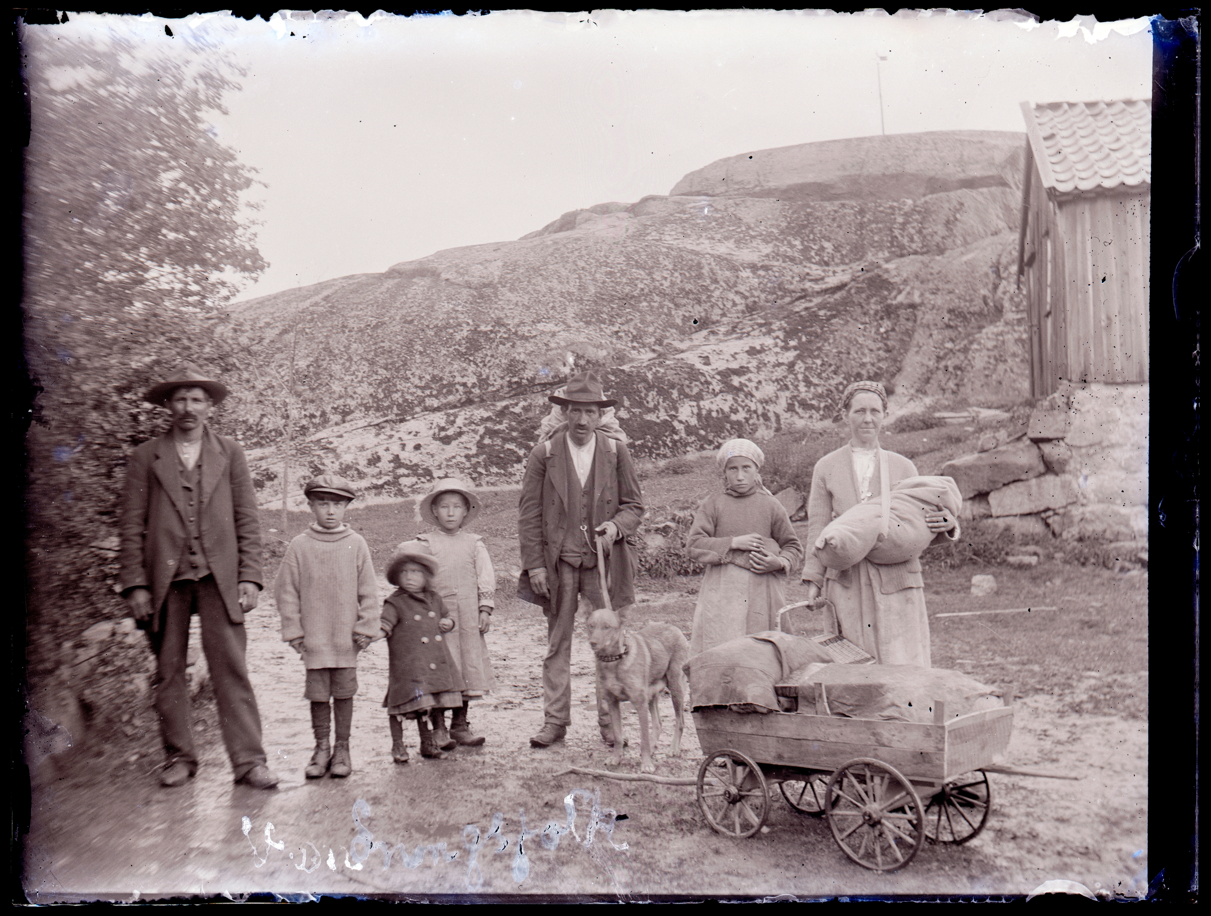 Fotografens anteckning på glasnegativet: "Vandringsfolk. Mannen längst till vänster heter Frans Oskar Rosenkvist-Magnusson. Mannen med hunden heter Adel Rosenkvist-Magnusson och är bror till Frans Oskar. Kvinna längst till höger heter Charlotte (Lotta) och är gift med Adel. Med på bilden är fem av deras nio barn. Flickan med hucklet, som står bredvid sin mamma Charlotte, heter Hildegard Teoline (1909-1989). Uppgifterna förmedlade av Ronny Magnusson, barnbarn till Hildegard Teoline. Fotografiet är publicerat i boken Snarsmon - resandebyn där vägar möte. Red: Bodil Andersson. Bohusläns museums förlag 2008, s. 15 och baksida. Bildtext: "Bondsonen och amatörfotografen Johan Johannsson dokumenterade människor och händelser i Bohuslän i början av 1900-talet. Resandefamiljen på bilden mötte han någonstans i norra Bohuslän." Jämför också fotografi UMFA53464:1742 om troligen föreställer samma personer samt ett tredje fotografi, UMFA53464:1741 publicerad på s. 72 i samma bok.